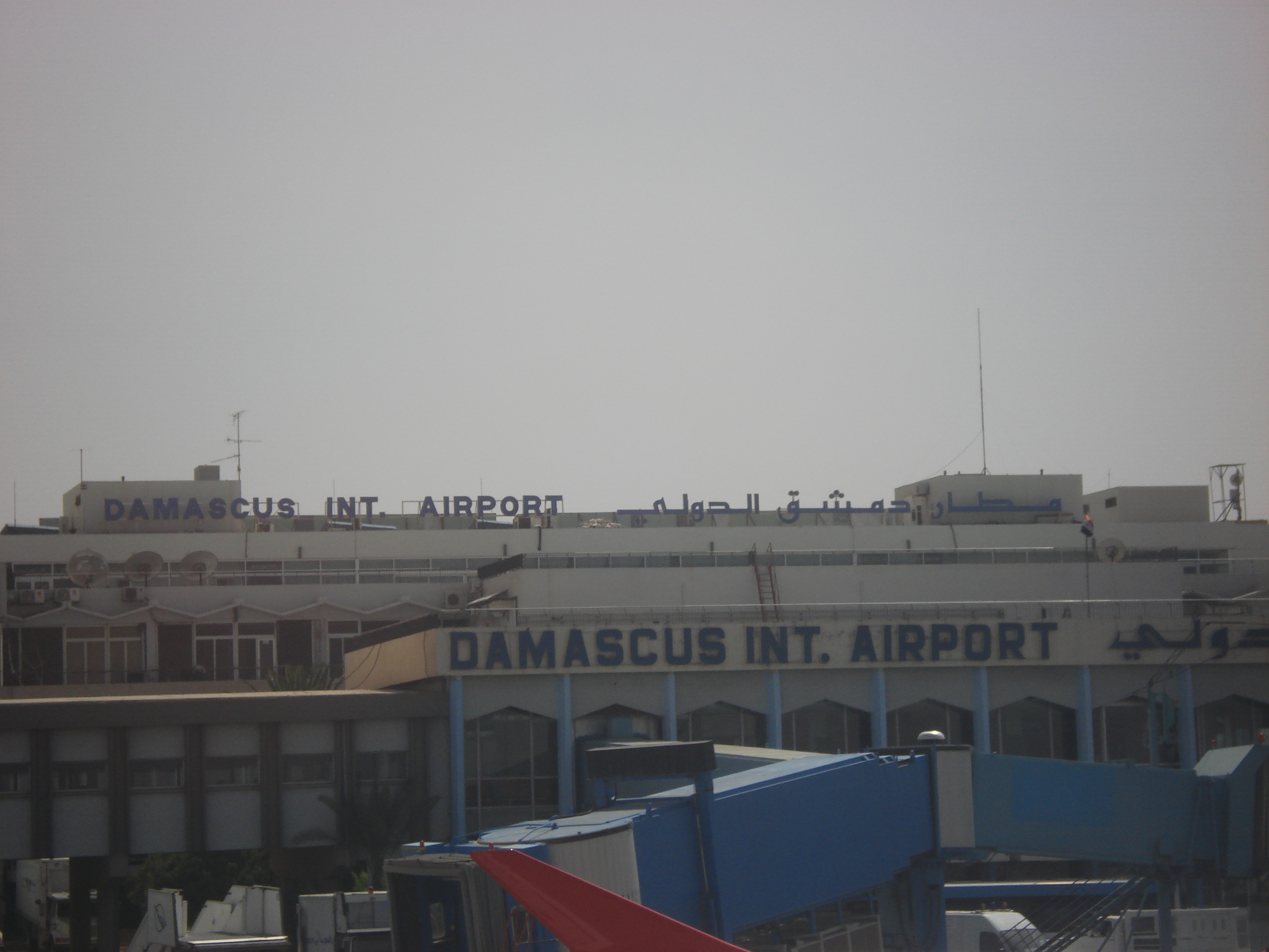 Damaskoksen lentoasema.